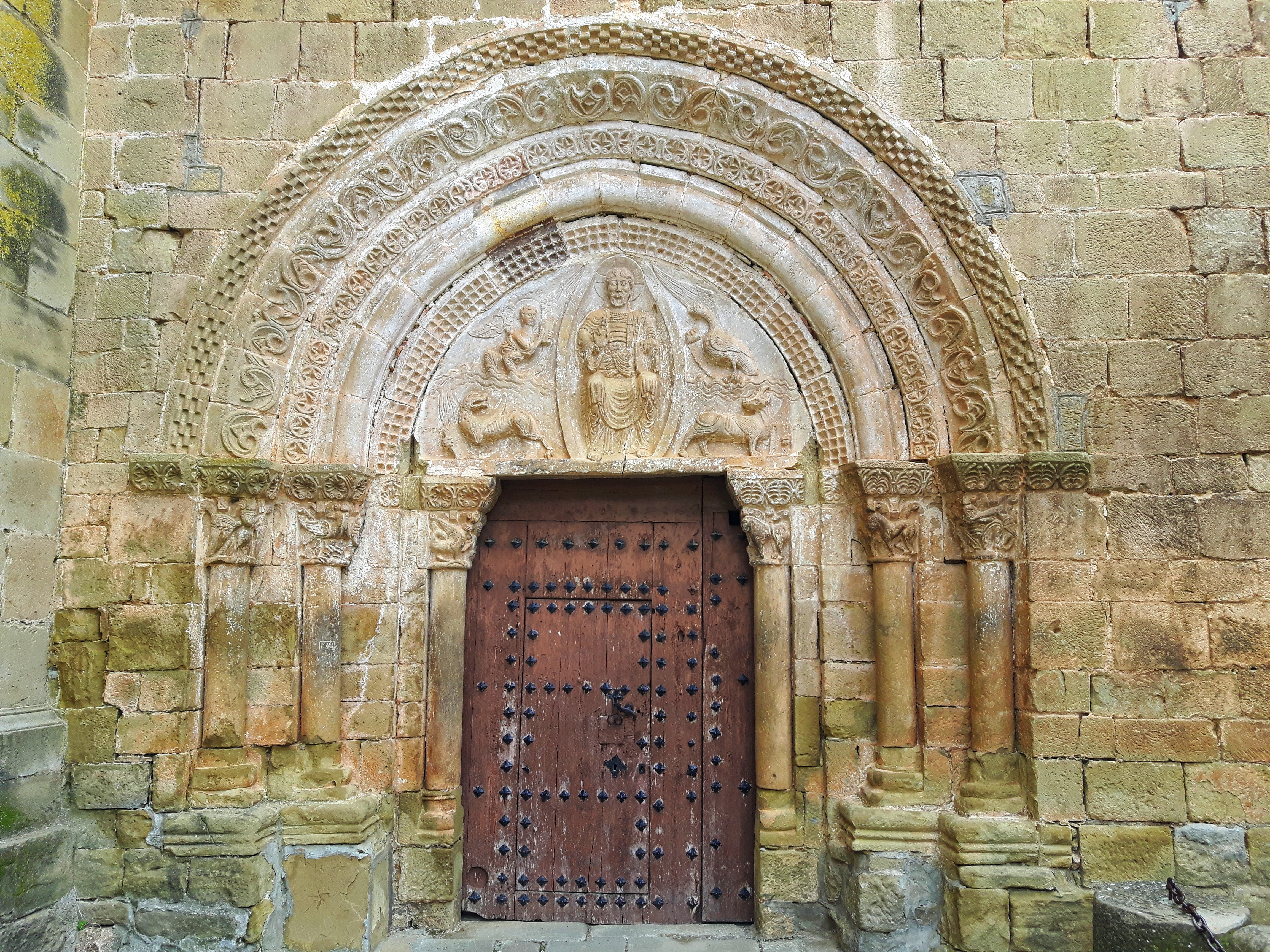 Iglesia Parroquial del Salvador